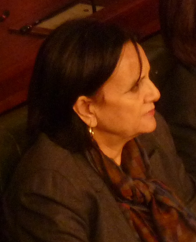 Latifa Lakhdar, ancienne ministre de la Culture et de la Sauvegarde du patrimoine dans le gouvenrment Essid